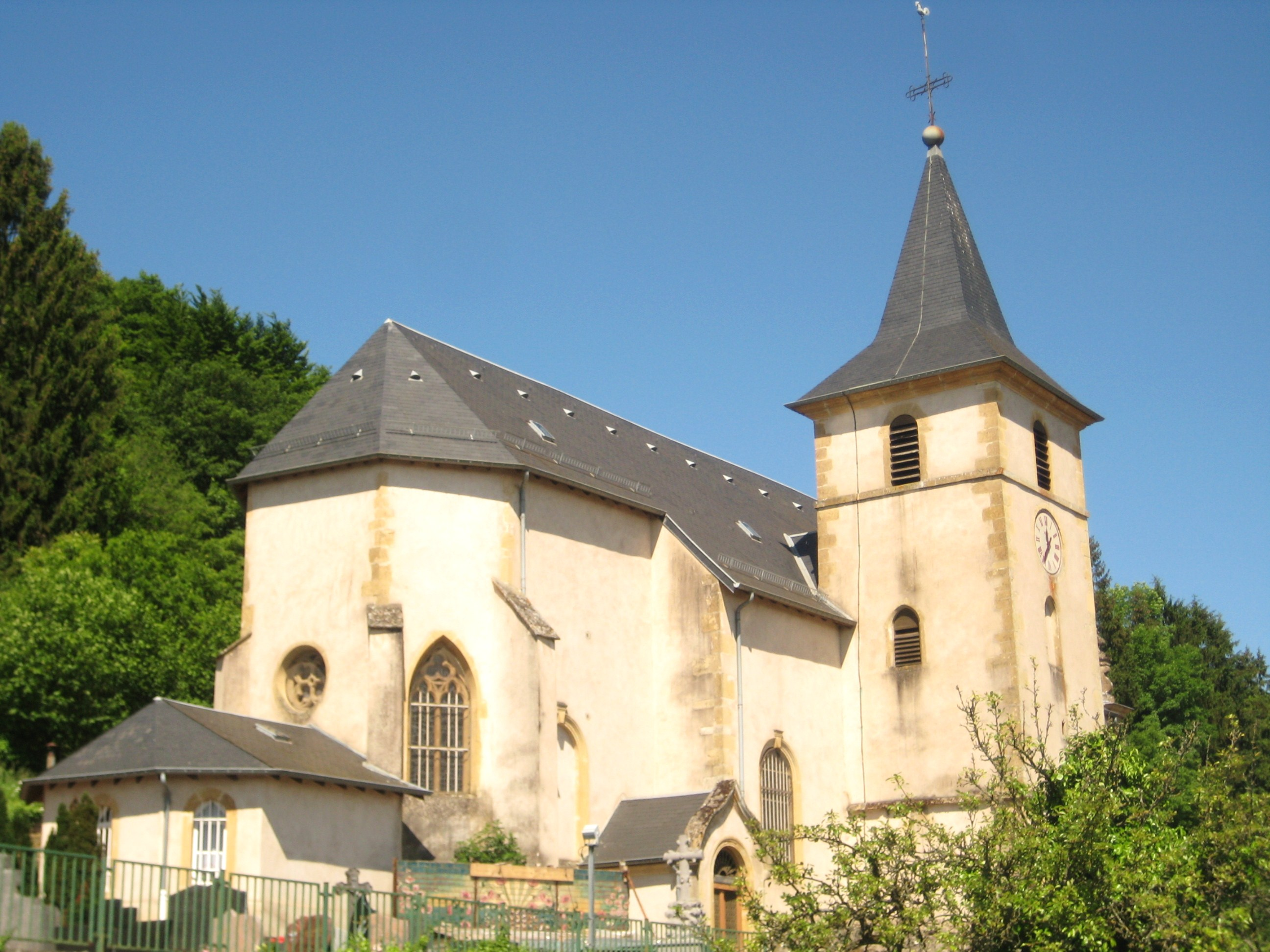 Description Église St-Jean-Baptiste de Volkrange Date4 June 2009Sourcemon appareil photoAuthorAimelaime Église St-Jean-Baptiste de Volkrange